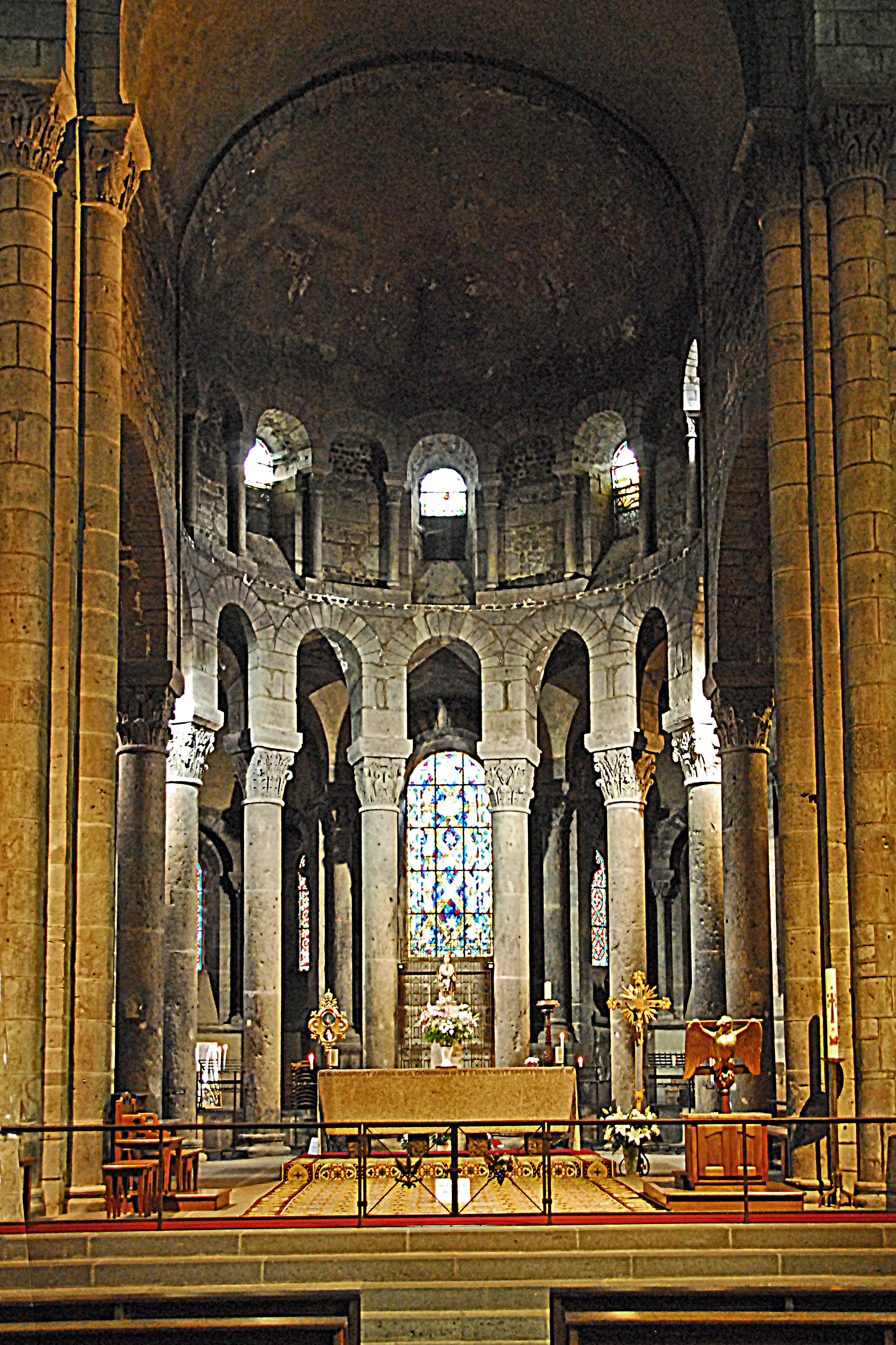 N.-D. d'Orcival, Chor aus Vierung